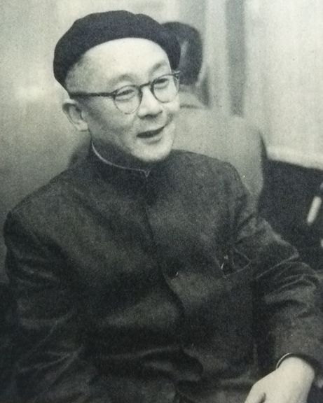 三木茂